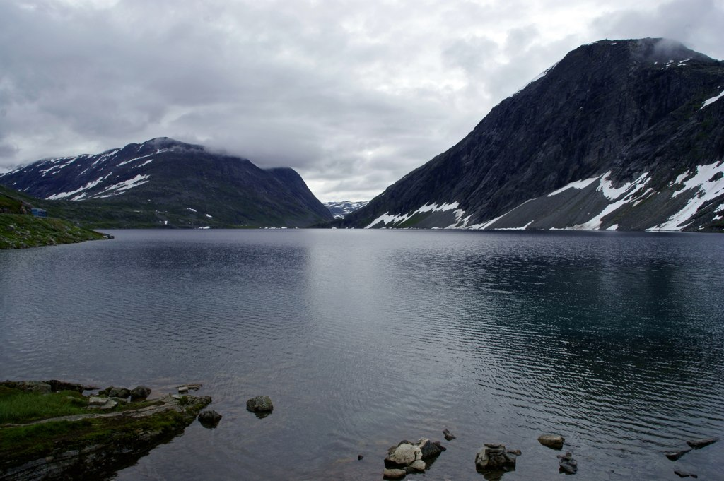 Djupvatnet i Stranda kommune